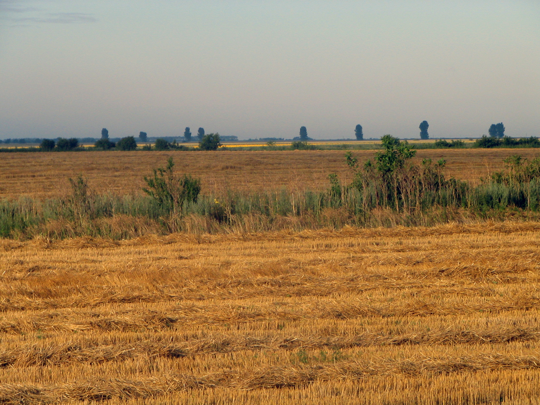 Peisaj în județul Călărași, România